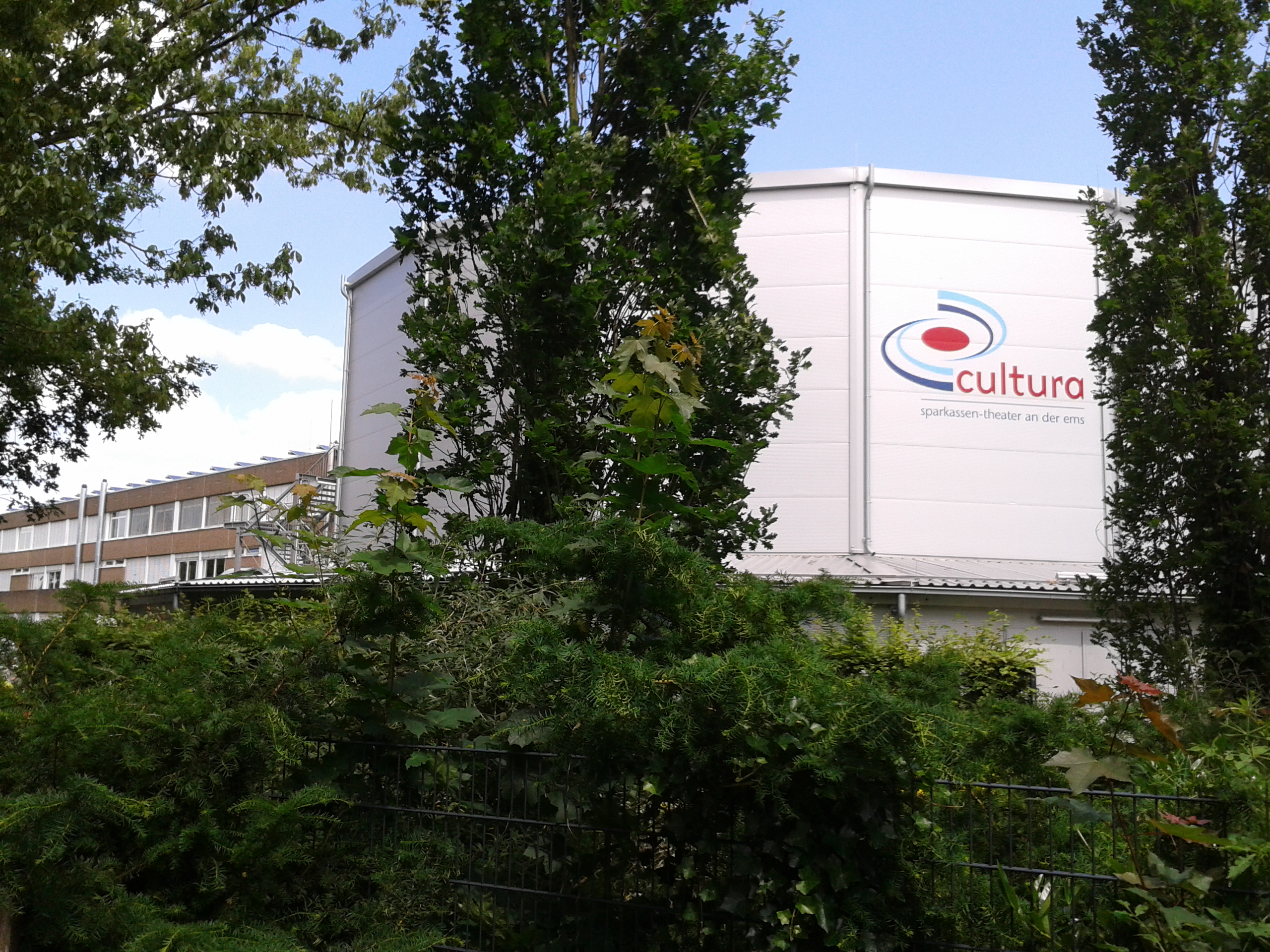 Sparkassentheater Rietberg Cultura